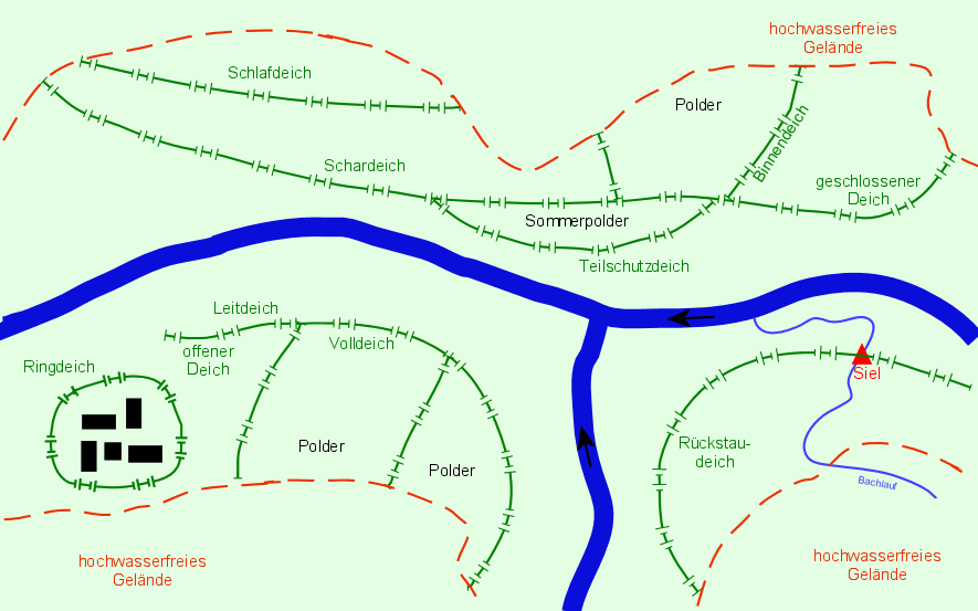 Deichsystem, Deicharten